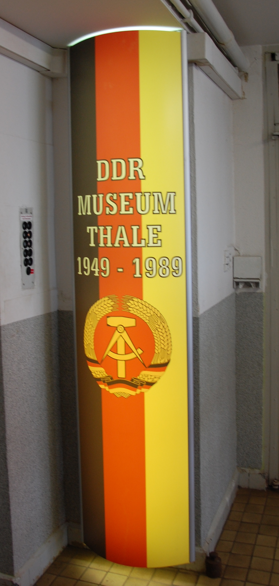 Werbung des DDR-Museums-Thale am Eingang zum Museum